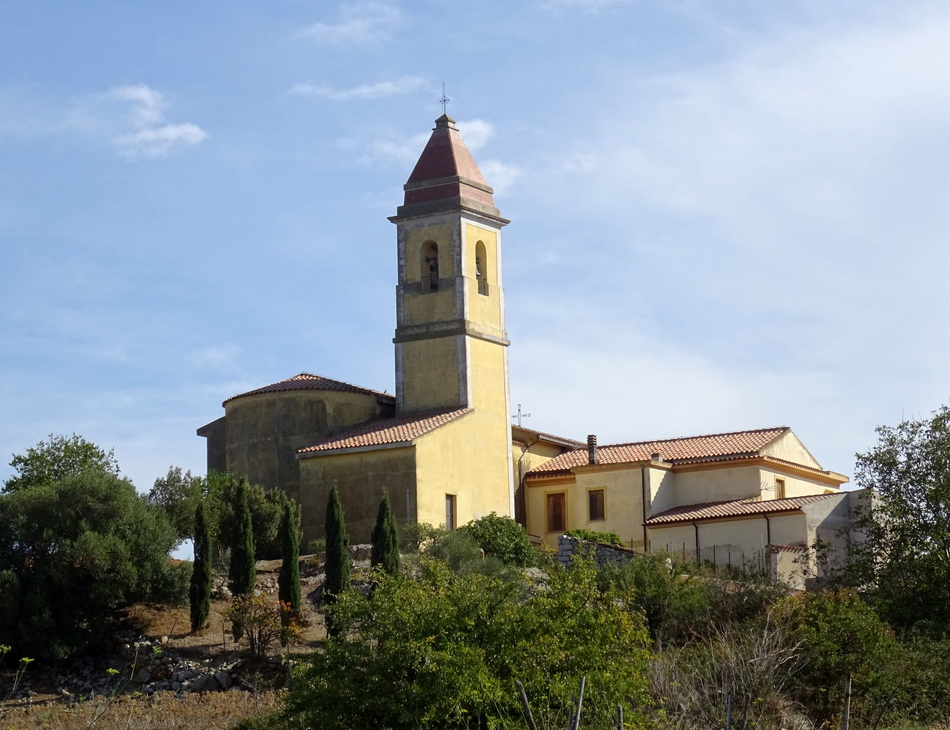 Chiesa parrocchiale del Sacro Cuore di Gesù.